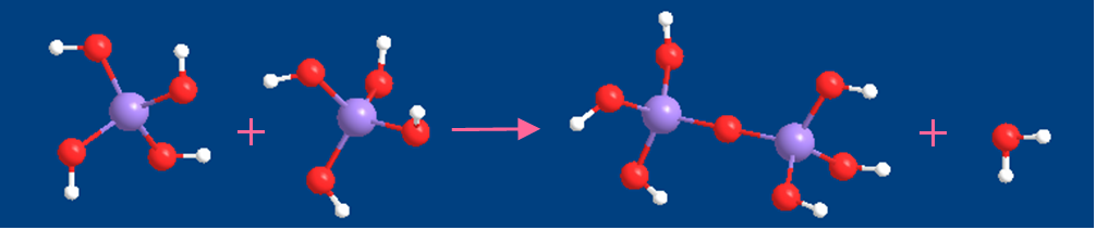 Schéma réactionnel de la condensation de deux groupements silanols. Auteur : Frédéric Chaput, réalisé avec un programme de dessin. Licence GFDL Frédéric Chaput